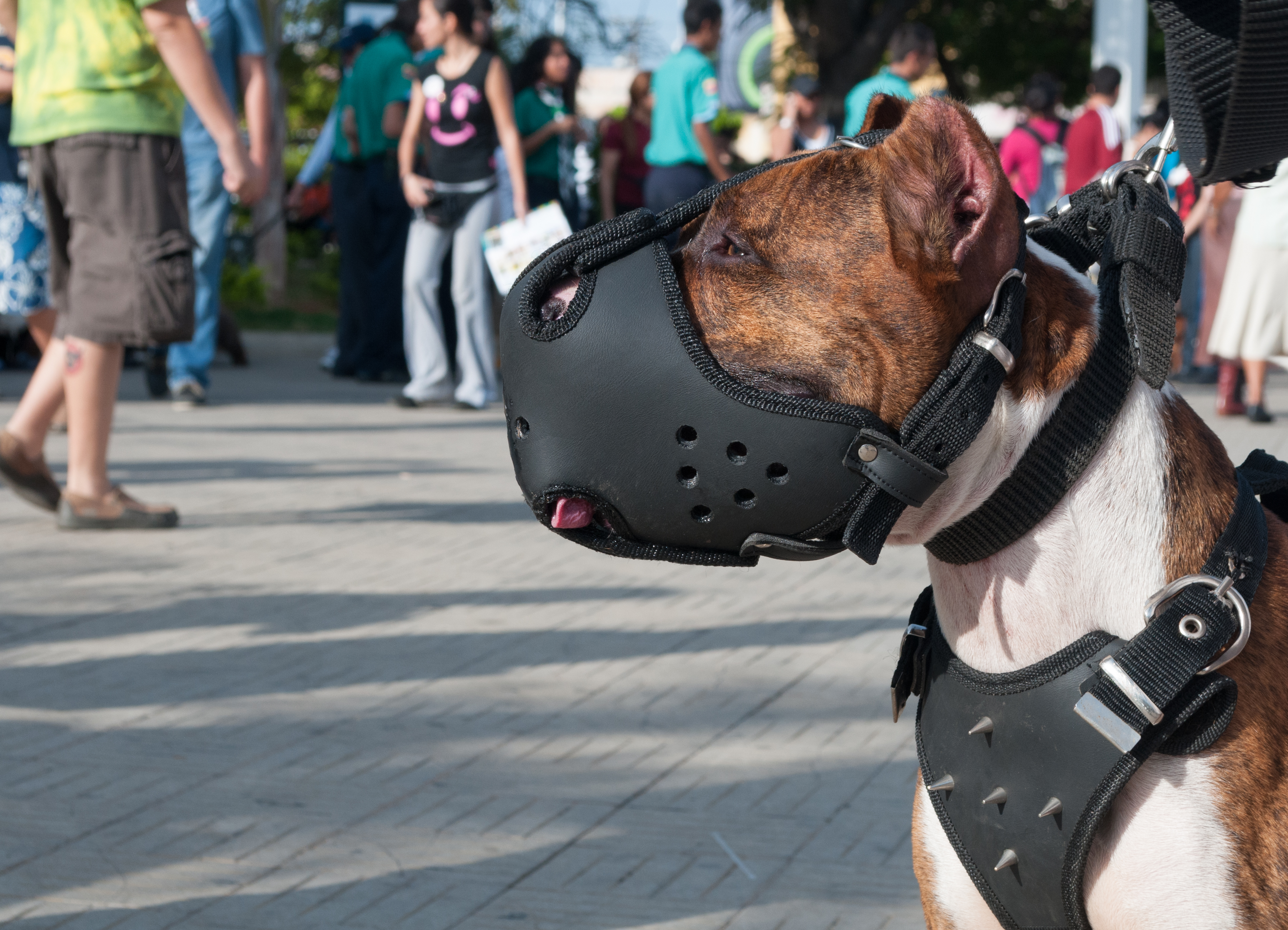 Caminata anual en favor de los animales celebrada en Maracaibo anualmente, en este caso el 3 de Noviembre de 2012